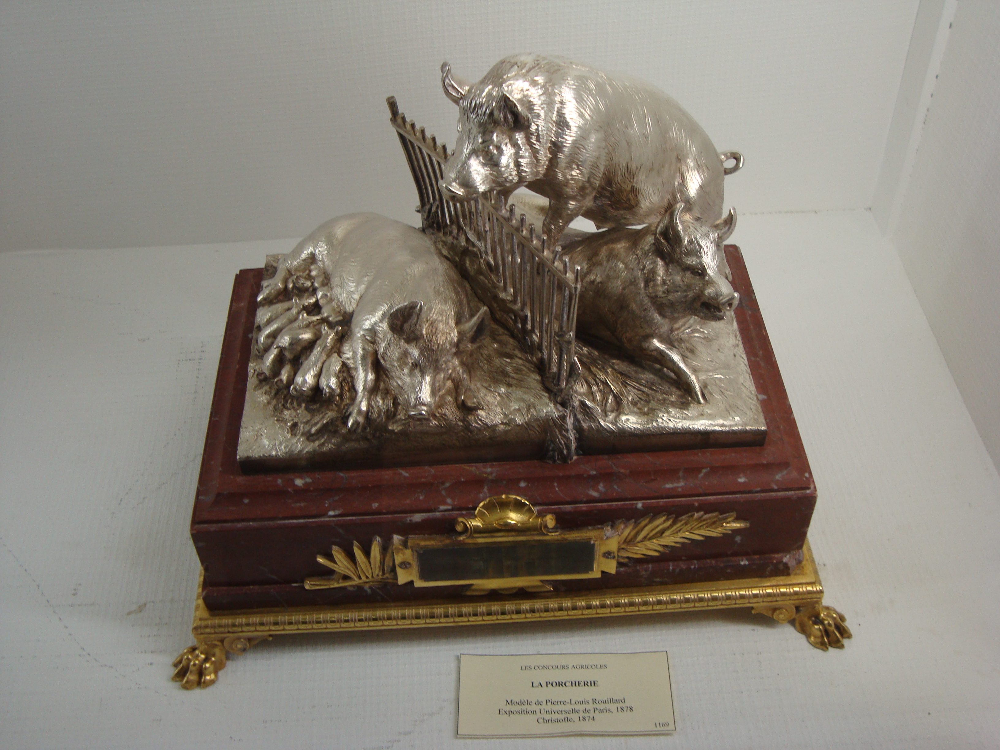 Les concours agricoles. La Porcherie. Modèle de Pierre-Louis Rouillard. Exposition Universelle de Paris, 1878. Christofle 1874. #1169